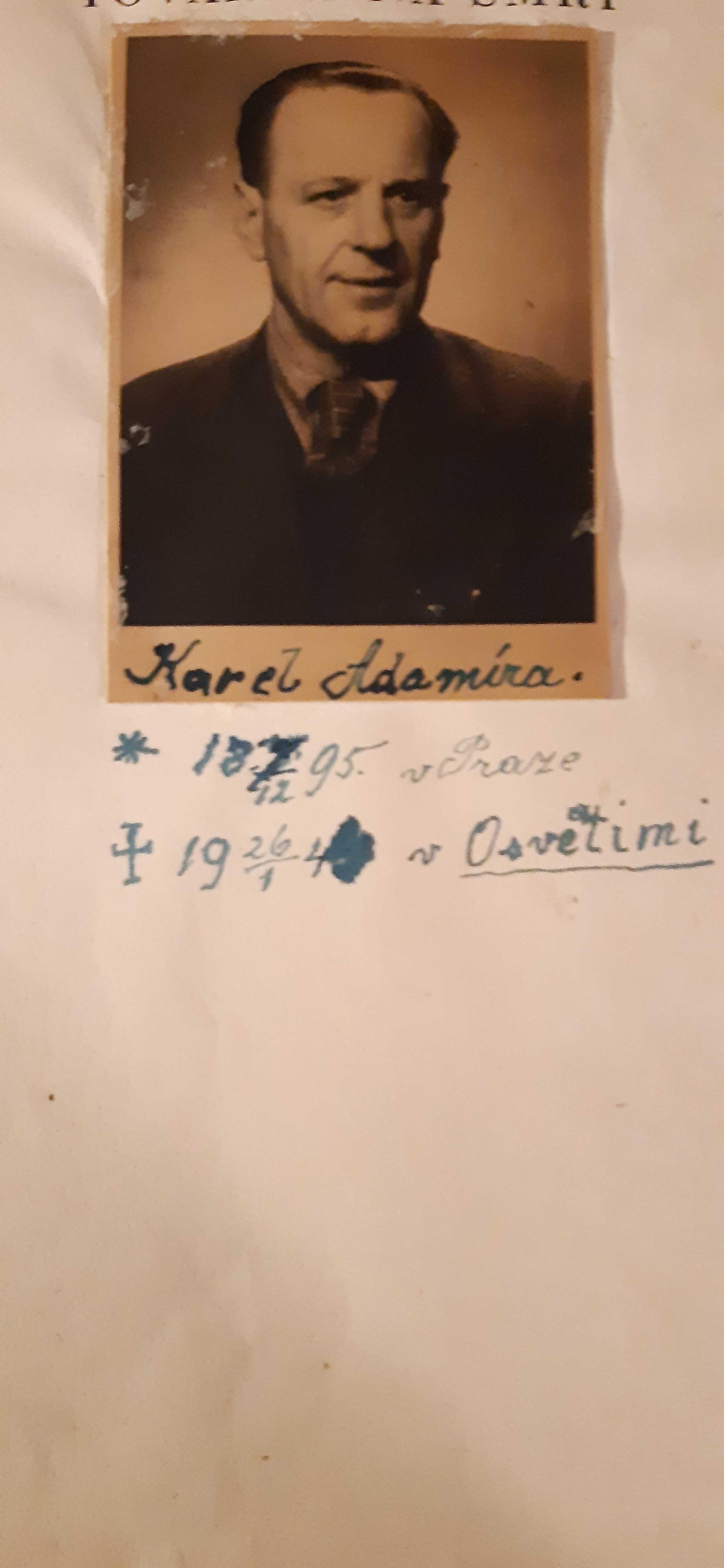 Karel Adamíra